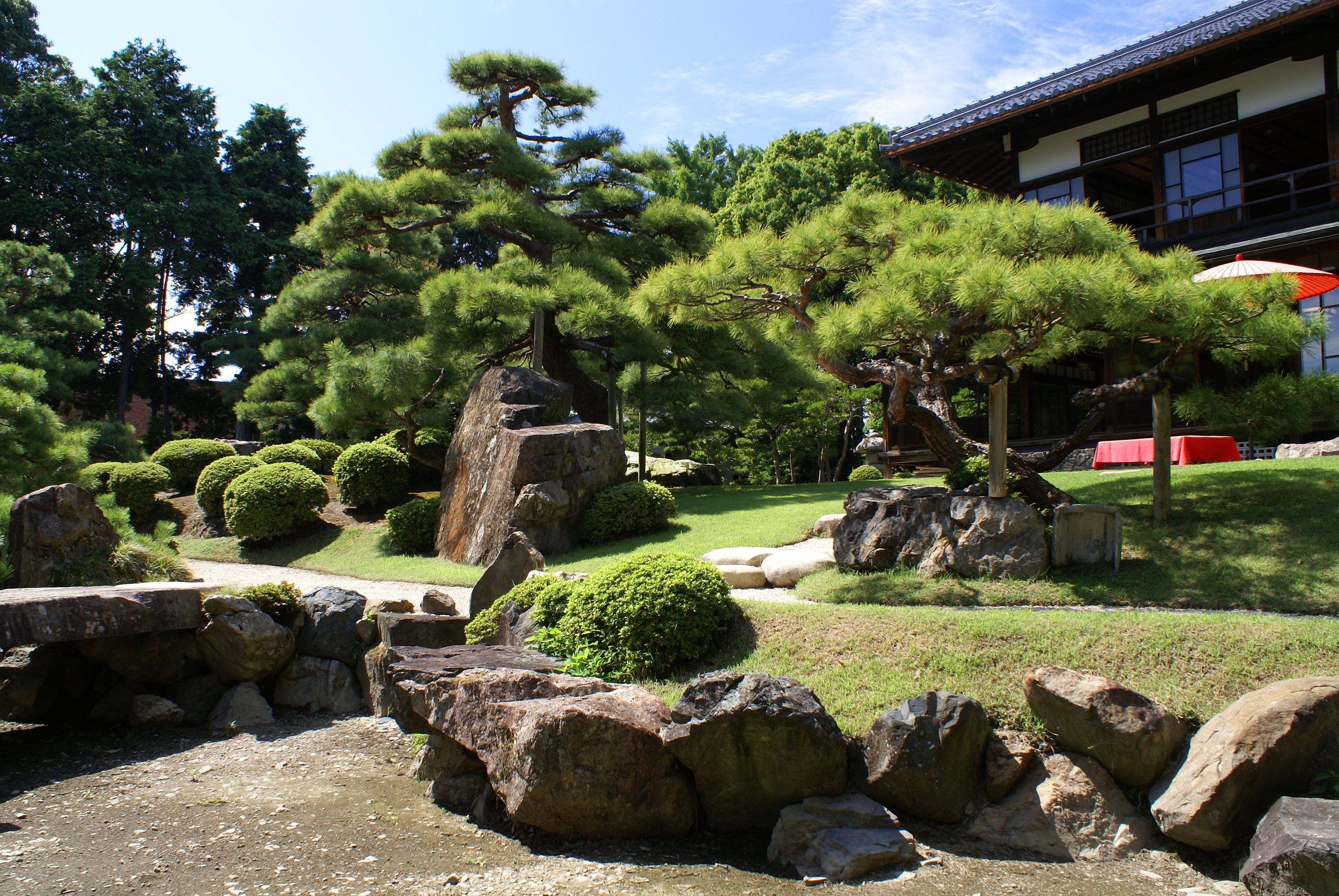 Keiunkan in Nagahama, Shiga, Japan